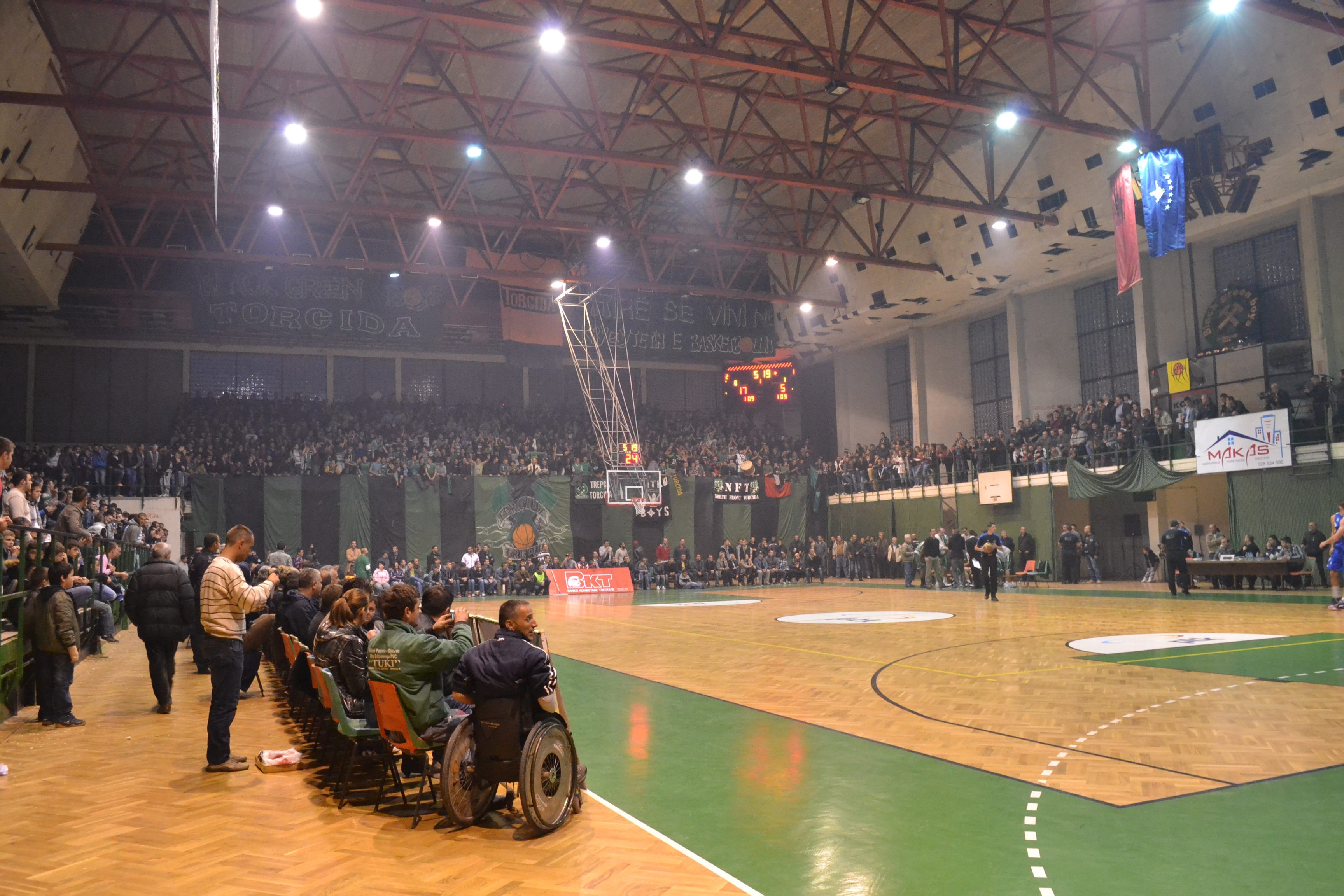 Pamje nga palestra 'Minatori' ku skuadra basketbollistike nga Mitrovica, Trepça i luan lojërat si vendas.